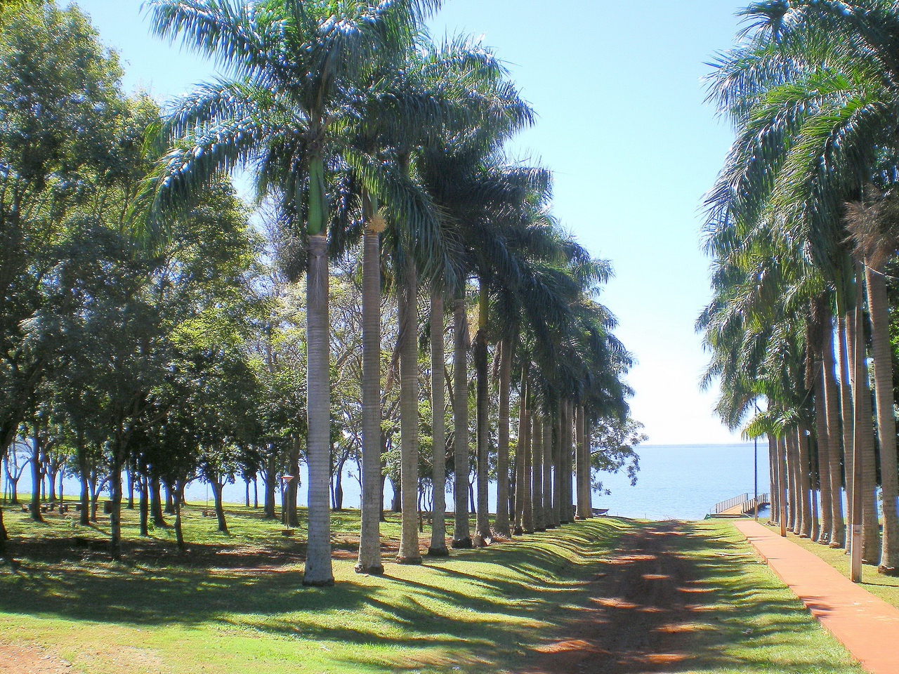 Fotos tomadas por mí, a inicios del año 2008 llegada al lago de Itaipu